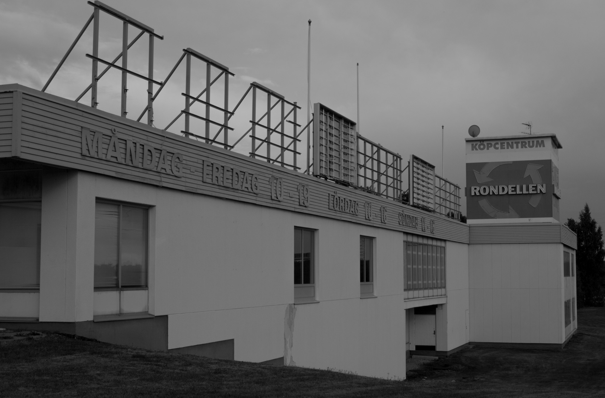 Köpcentrumet Rondellen i Eskilstuna